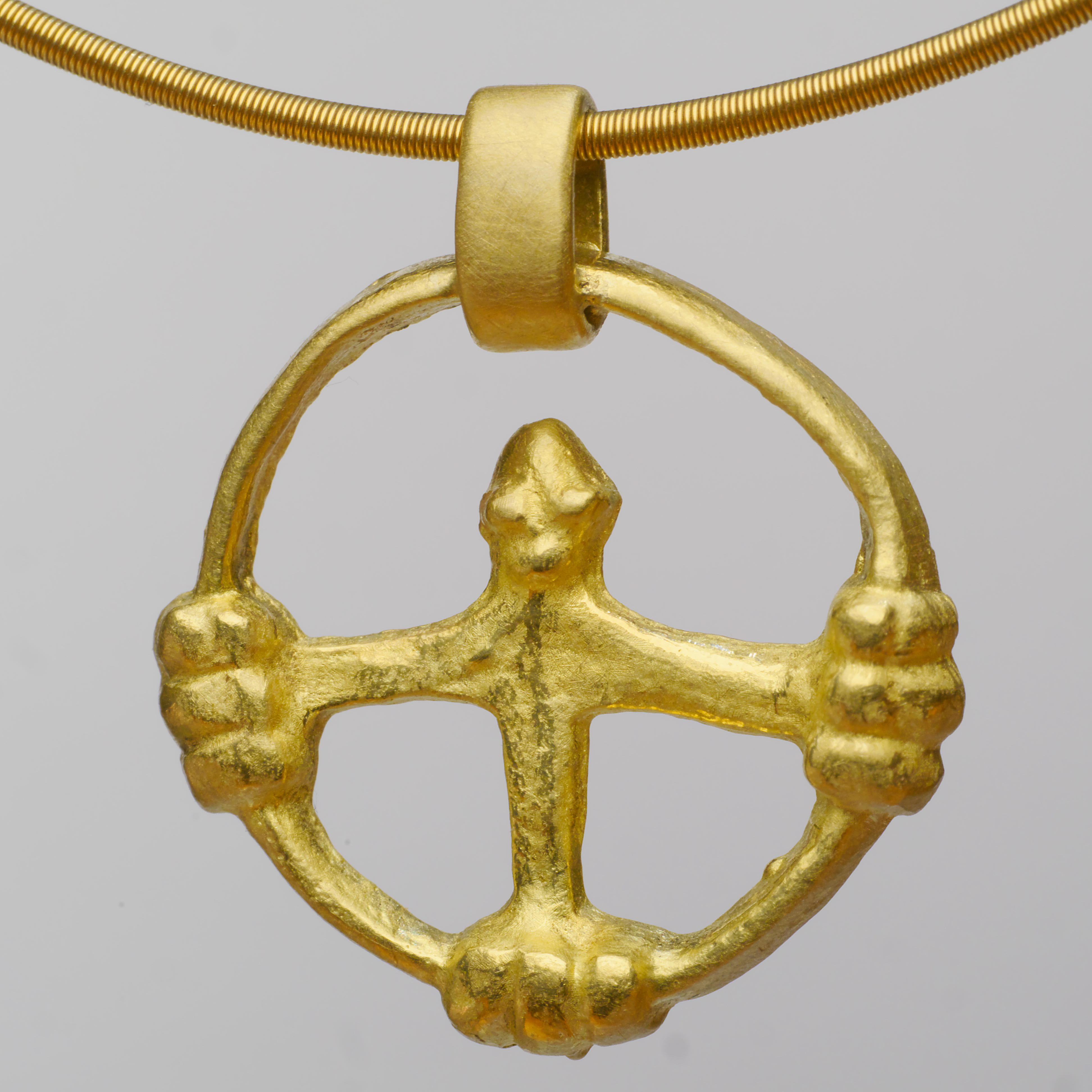 Replikat des Spandauer Kreuzes aus Gold mit Aufhänger und Kette.